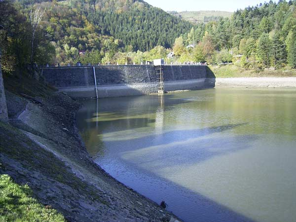 Bystřička - přehradní hráz